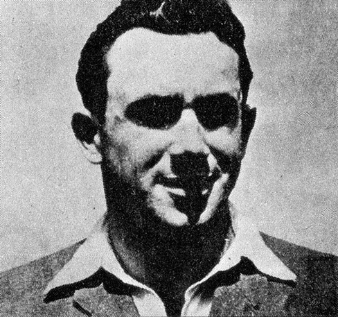 Ivan Gubijan